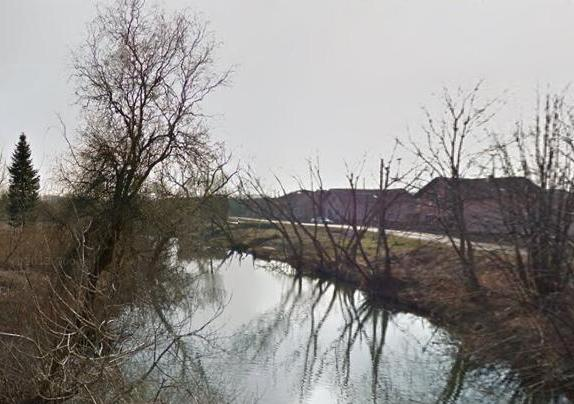 Річка у Хорватії Суня.